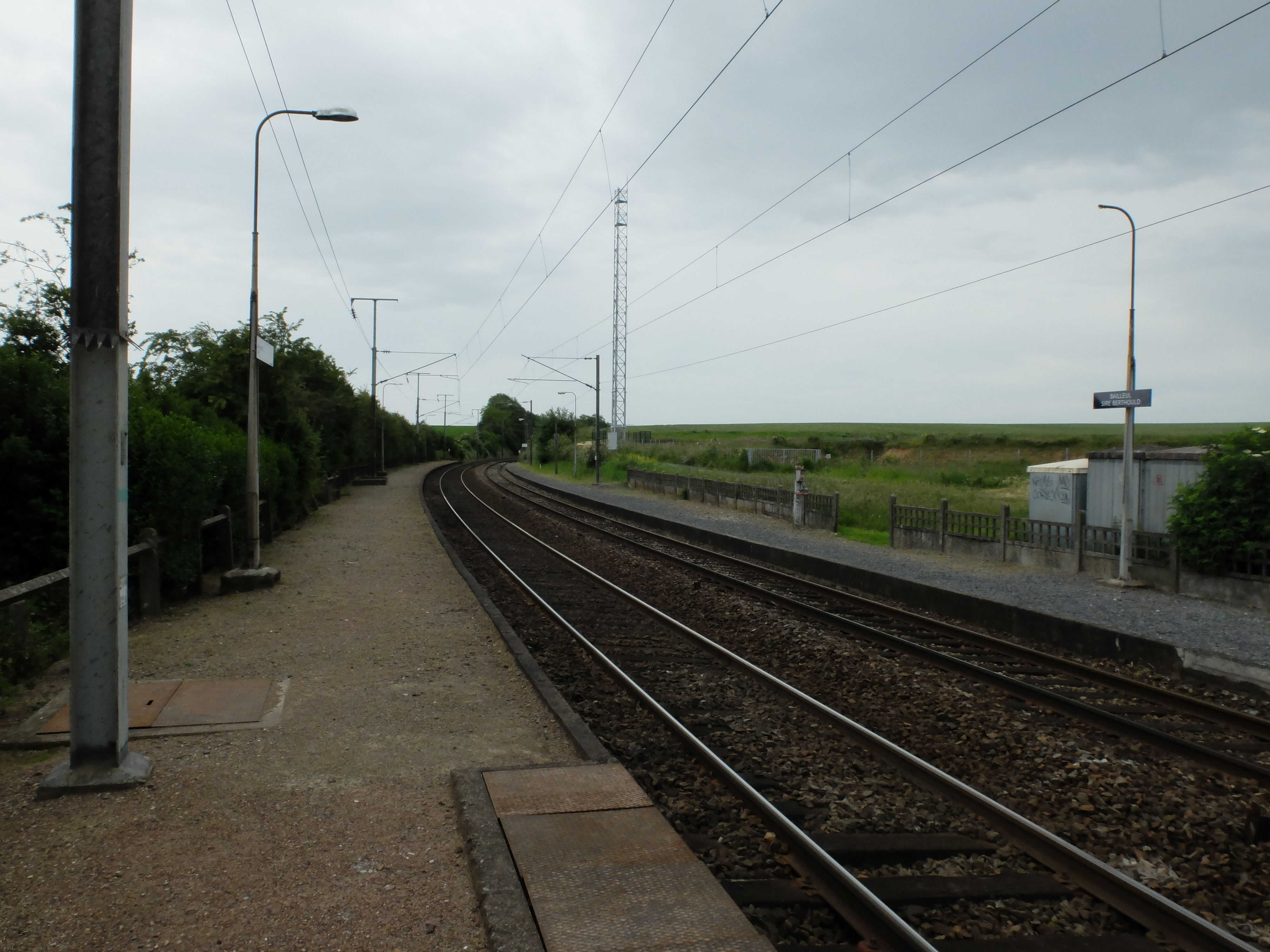 Vue de la halte ferroviaire de Bailleul-Sir-Berthoult.